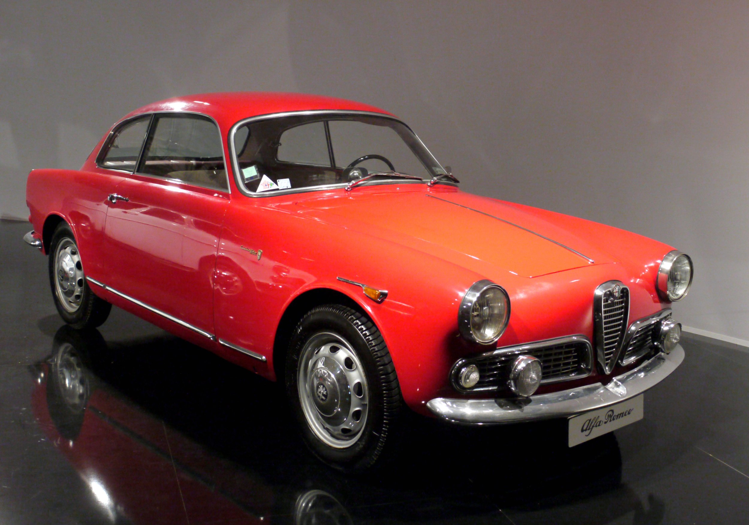 1954-1962 Alfa-Romeo Giulietta Sprint.